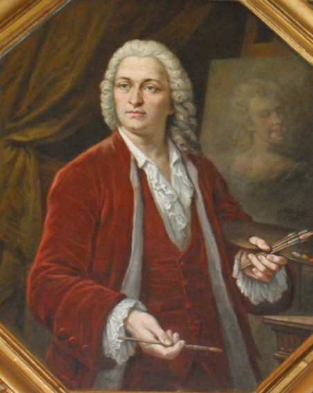 Portrait de Jean-Baptiste van Loo par Joseph Villevieille.